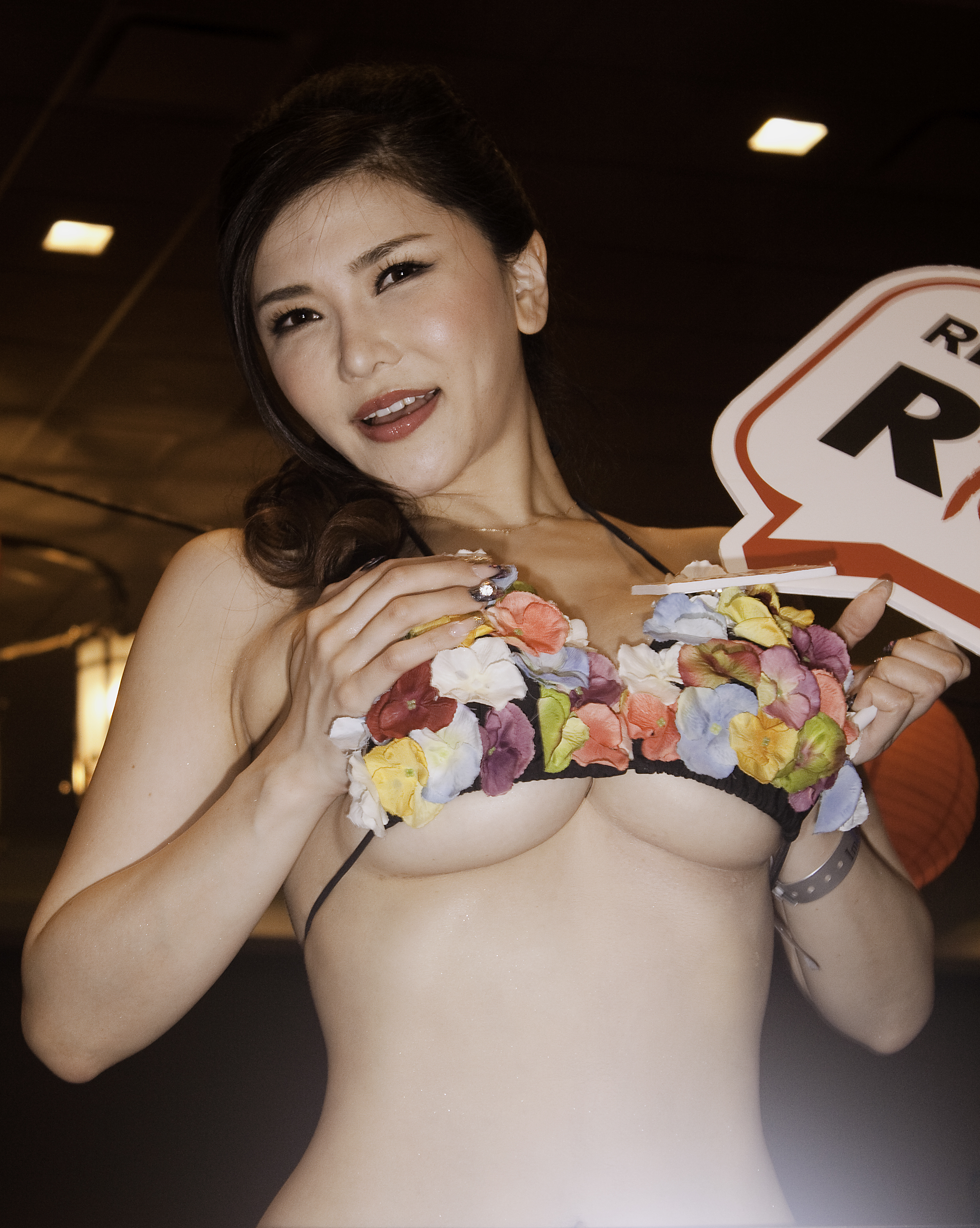 AEE16_0447bas